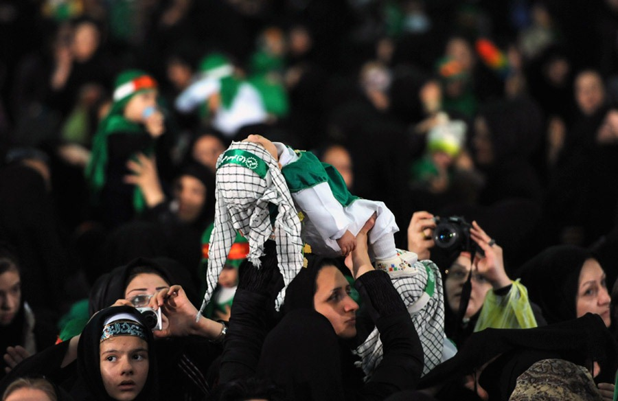 همایش شیرخوارگان حسینی در مصلی تهران- محرم 1390 شمسی